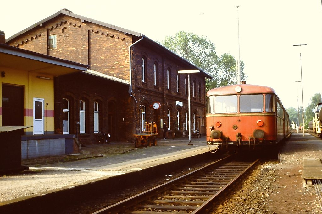 Verbrennungstriebwagen der Baureihe 798 im Bahnhof Brunsbüttel.